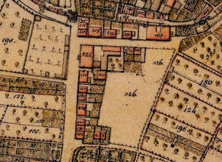 Steigvorstadt Marktbreit, Aufnahme im Urkataster Bayern 1825